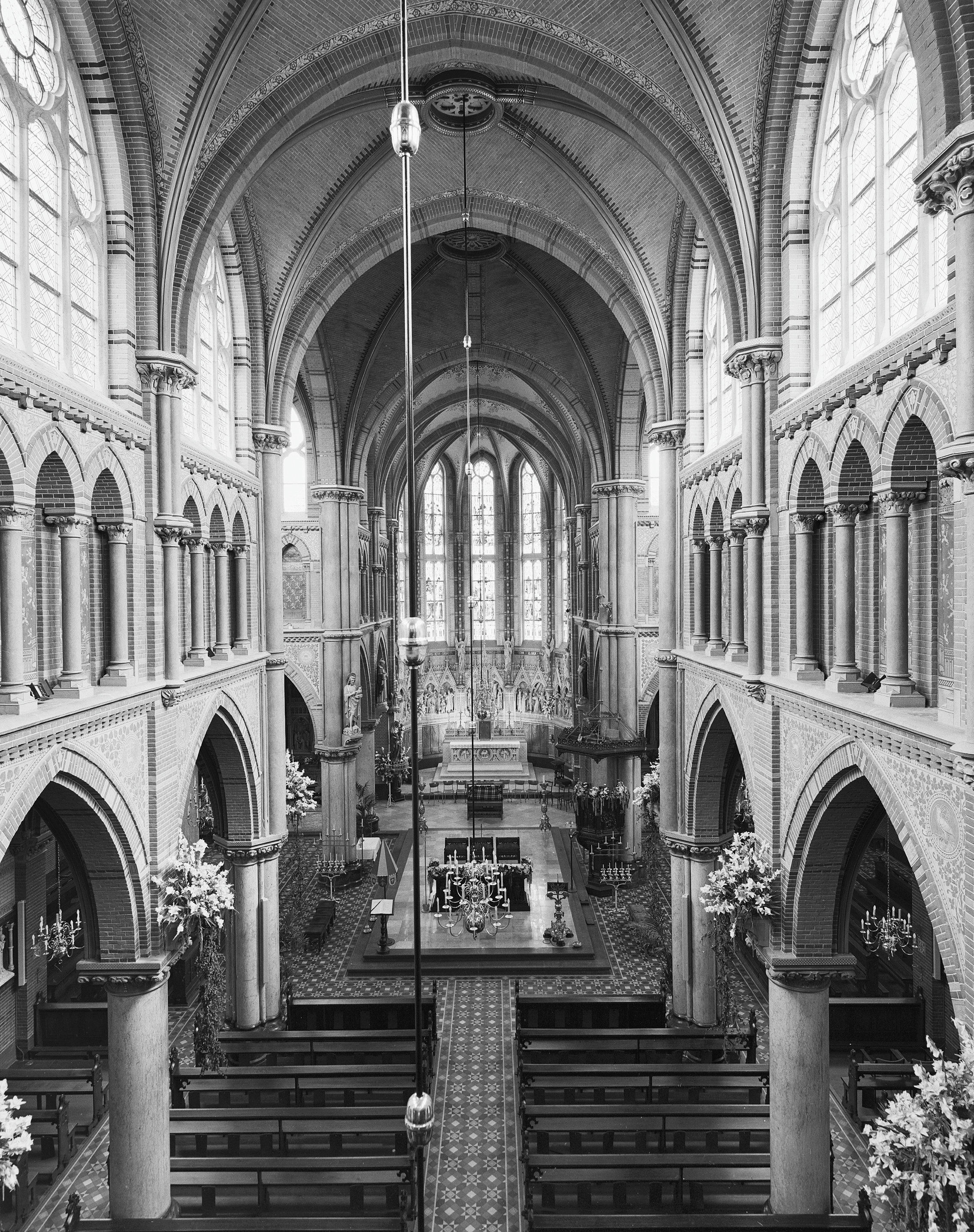 Rooms-katholieke Sint Liduina Rozenkrans kerk: Int. overzicht van bovenaf richting hoofdaltaar